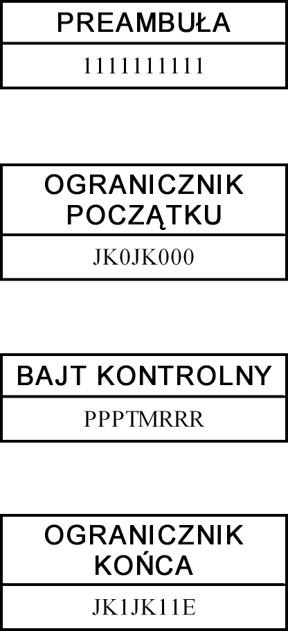 Token frame